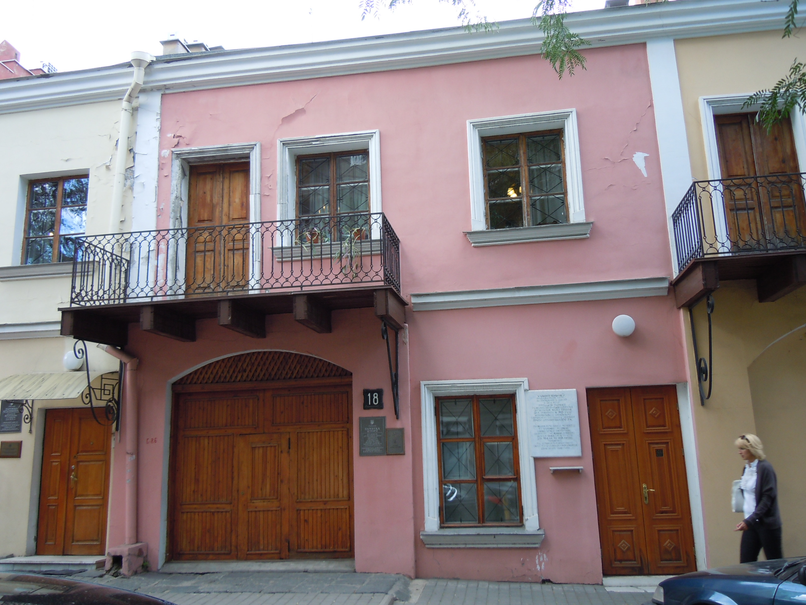 Будинок, де містився центр таємного грецького товариства “Філікі Етерія”